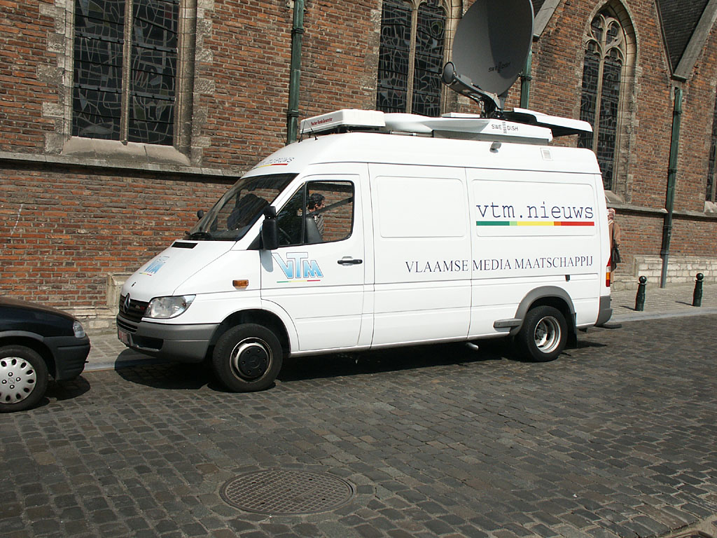 Mercedes-Benz Sprinter van het VTM-nieuws. Brussel, 2004. Eigen foto.